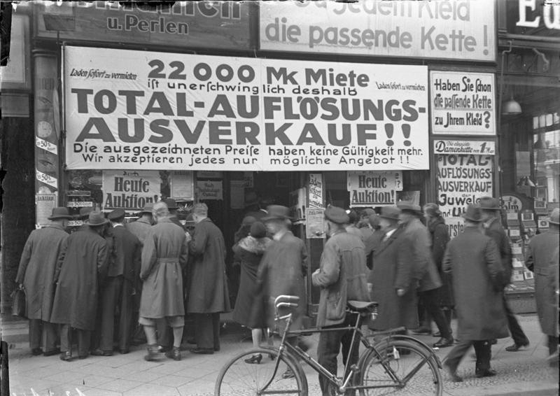 Total-Auflösungs-Ausverkauf eines Geschäftlokals in der Friedrichstrasse, dass infolge der enorm hohen Miete schliessen muss. Der wegen zu hoher Miete zur Aufgabe gezwungene Laden in der Friedrichstrasse.